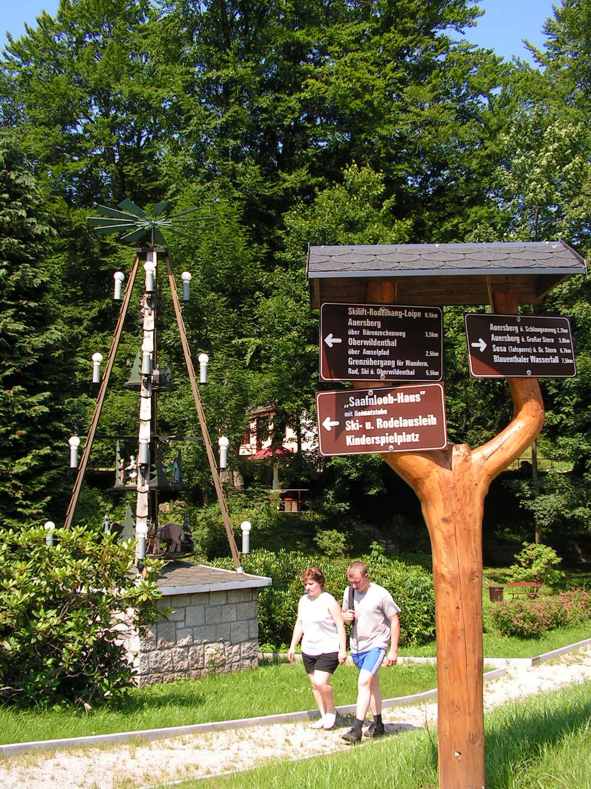 Im Park, Urheber: Der WildenThaler 19:55, 3. Jan. 2007 (CET)